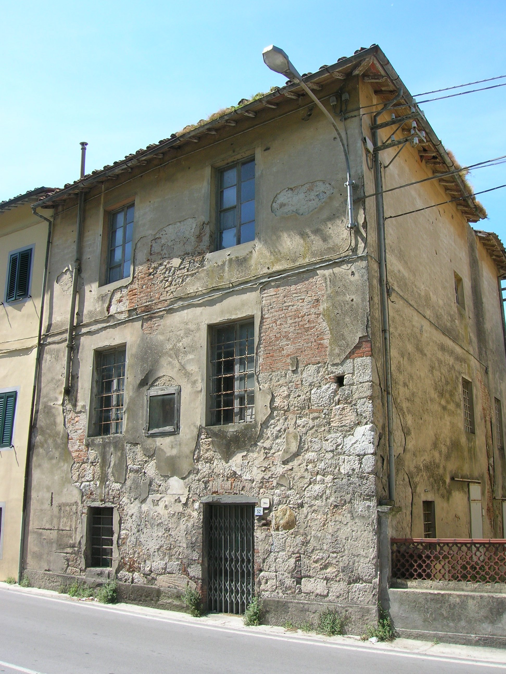 Resti della vecchia torre di Uliveto Terme